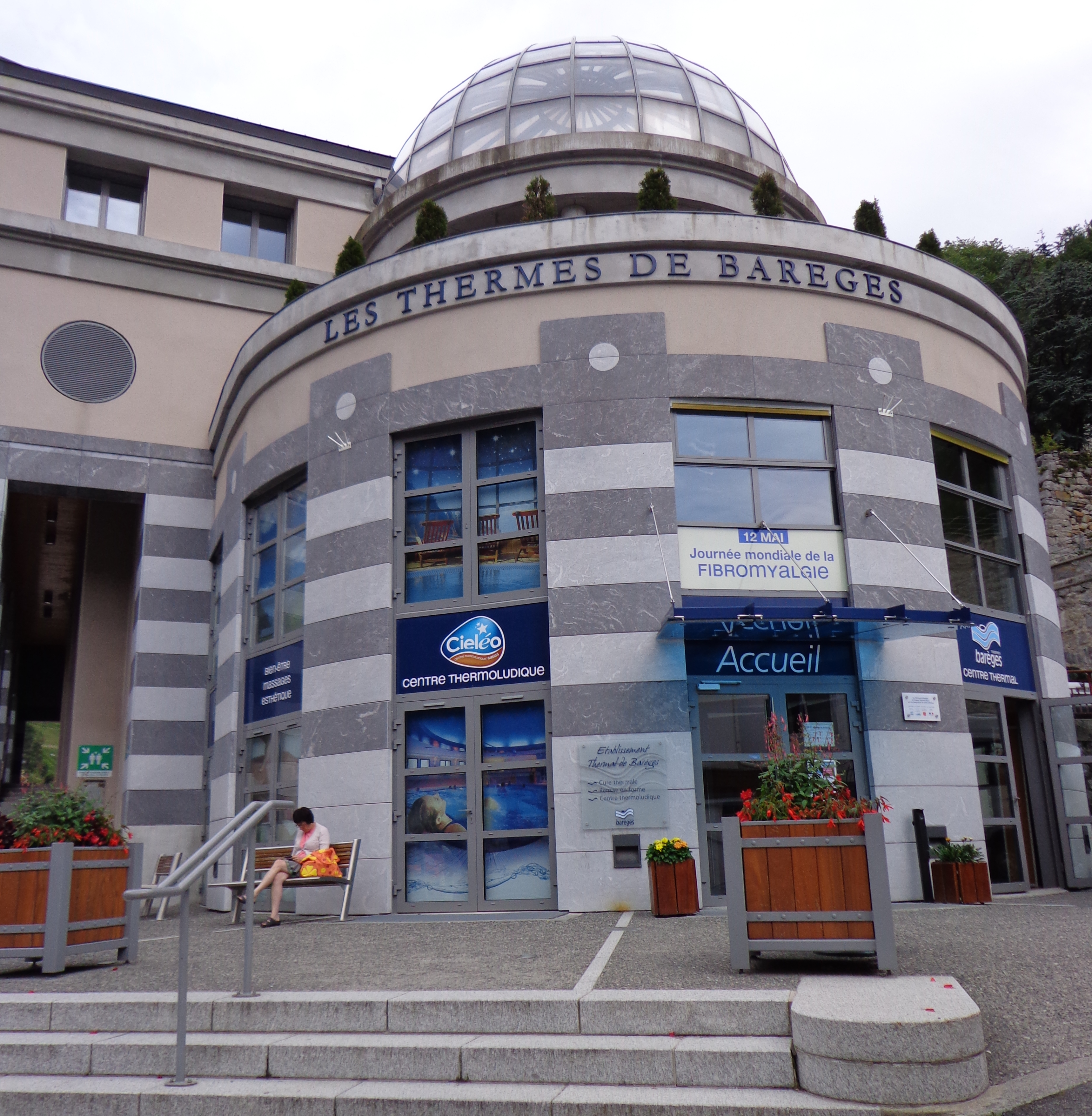 Entrée principale des Thermes de Barèges